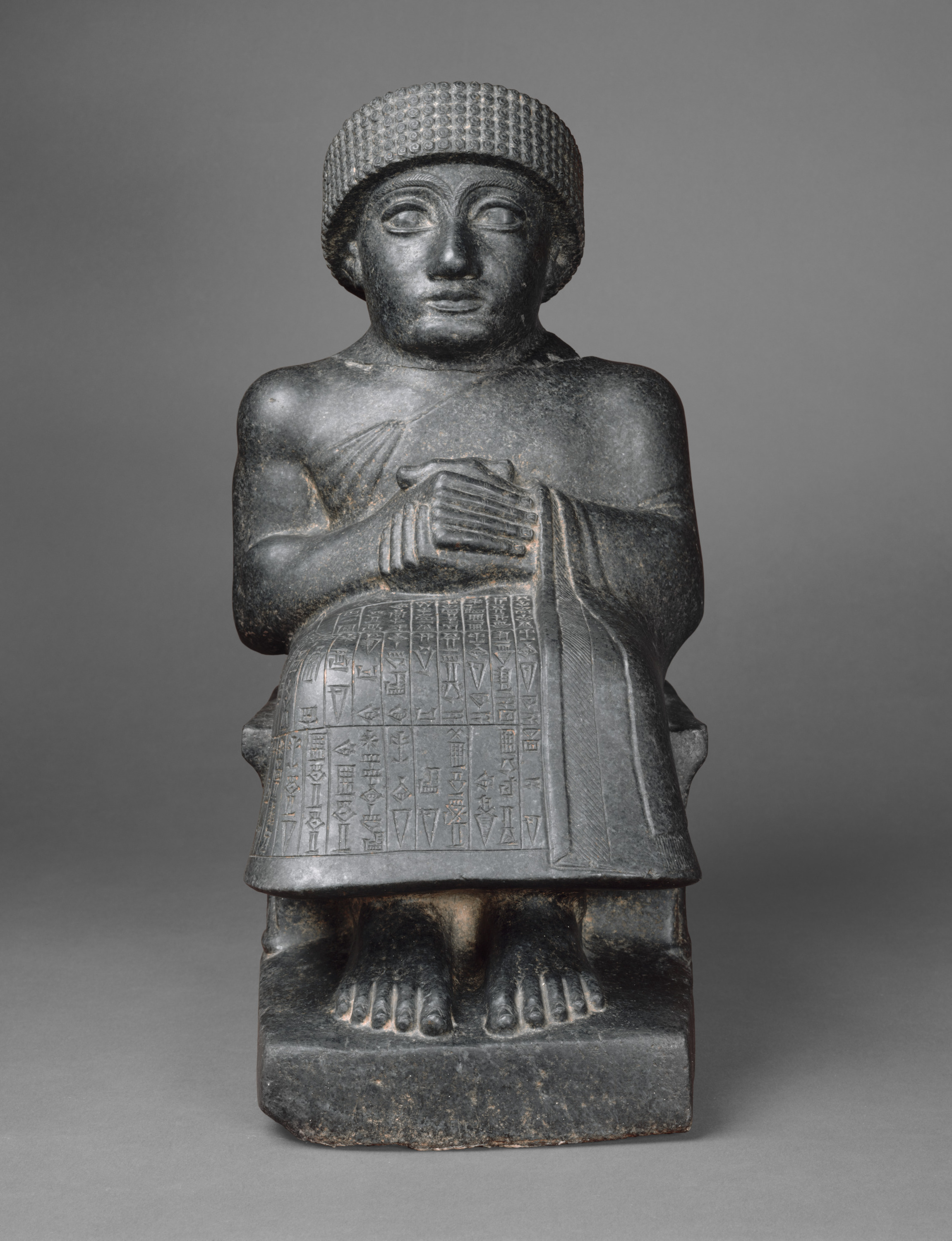 Neo-Sumerian; Sculpture; Stone-Sculpture-Inscribed